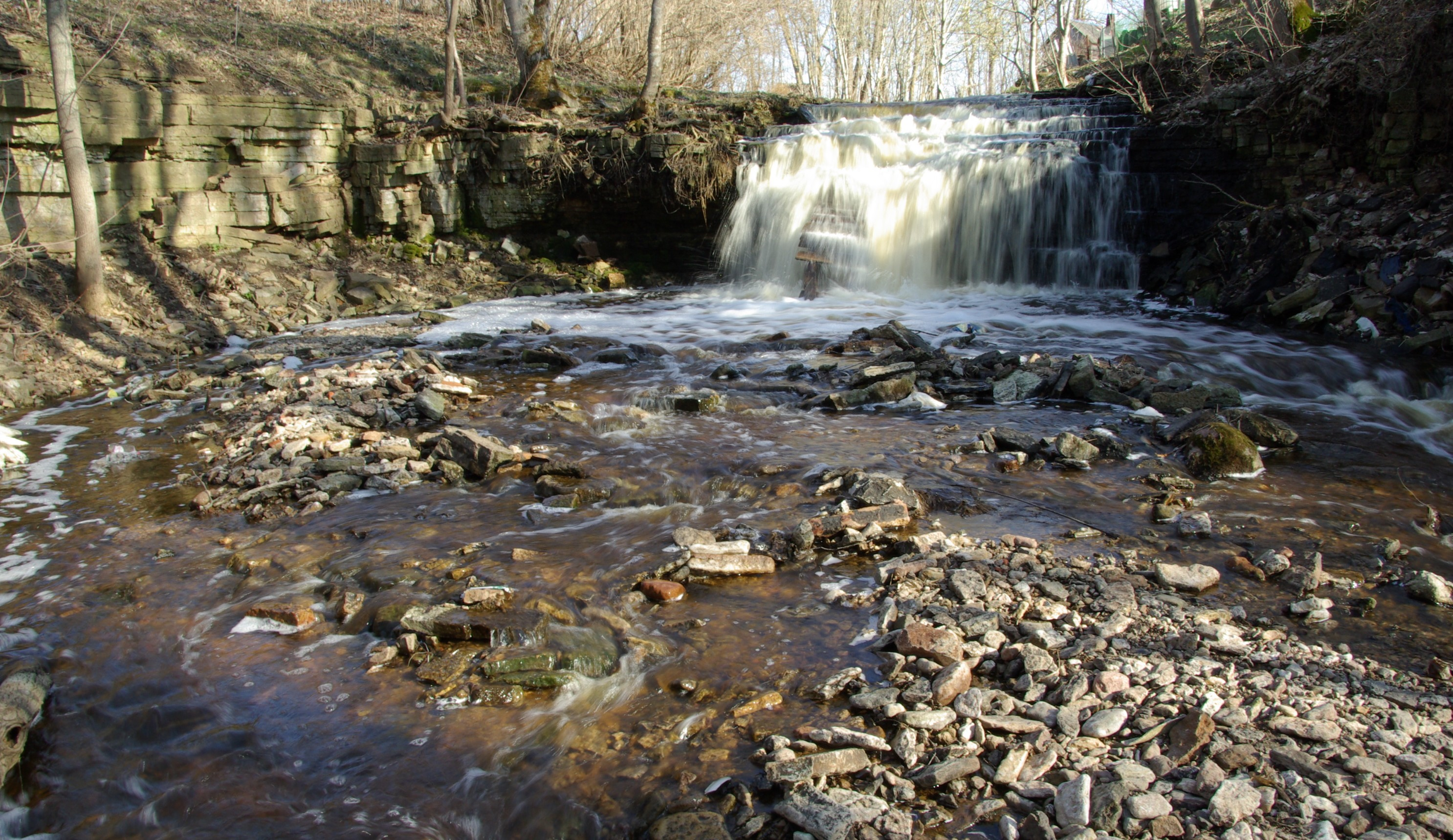 Tõrvajõe juga asub Tõrvajõe külas Vaivara vallas Ida-Viru maakonnas